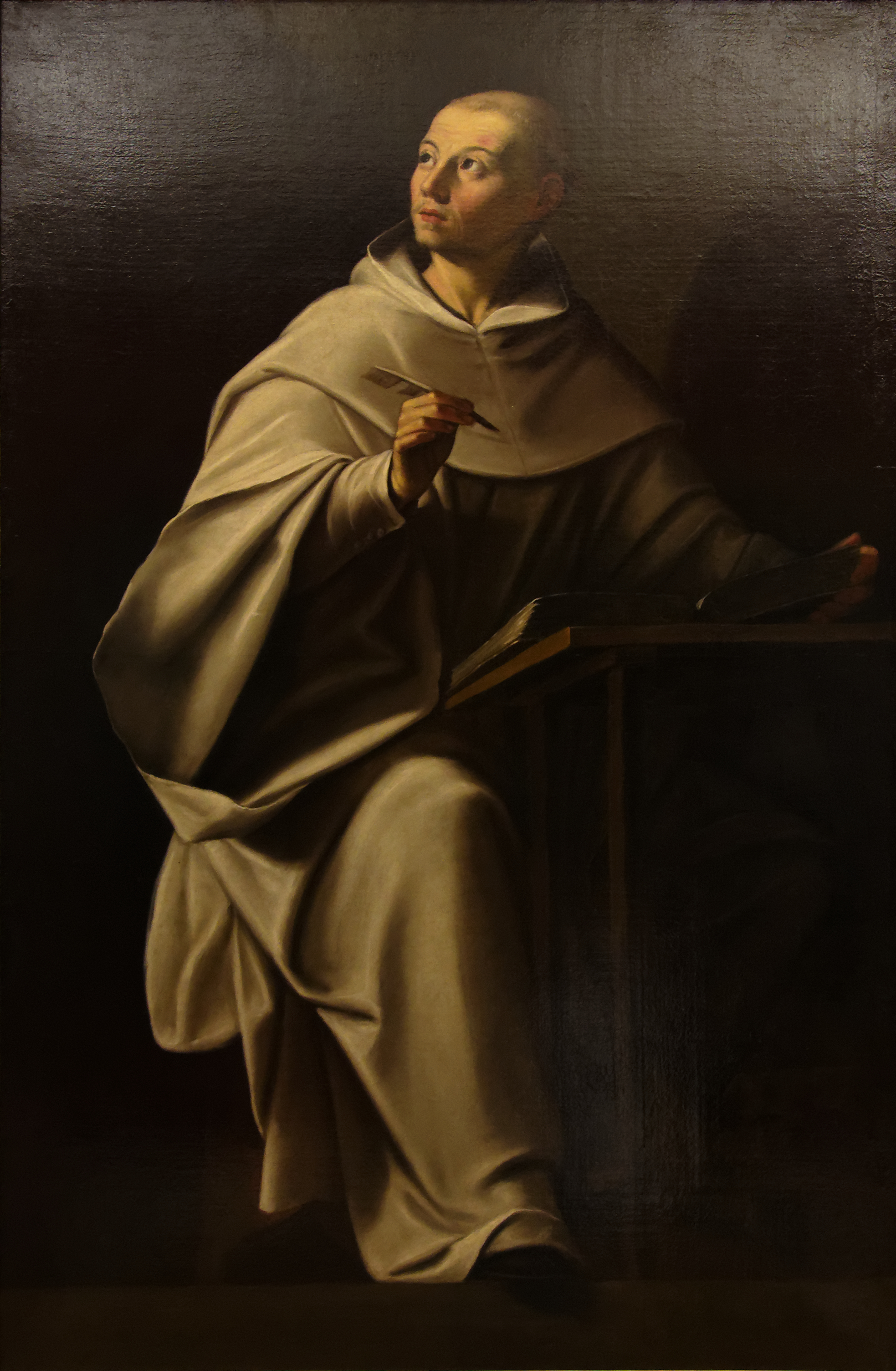 Moine à Cîteaux en 1112, saint Bernard (Fontaine-les-Dijon, 1091 - Clairevaux ,1153) fonda en 1115 l'abbaye de Clairevaux. Il devint l'une des principales personnalité de l'Occident chrétien.